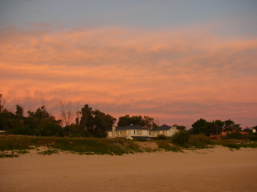 Una "Mansion" de portezuelo